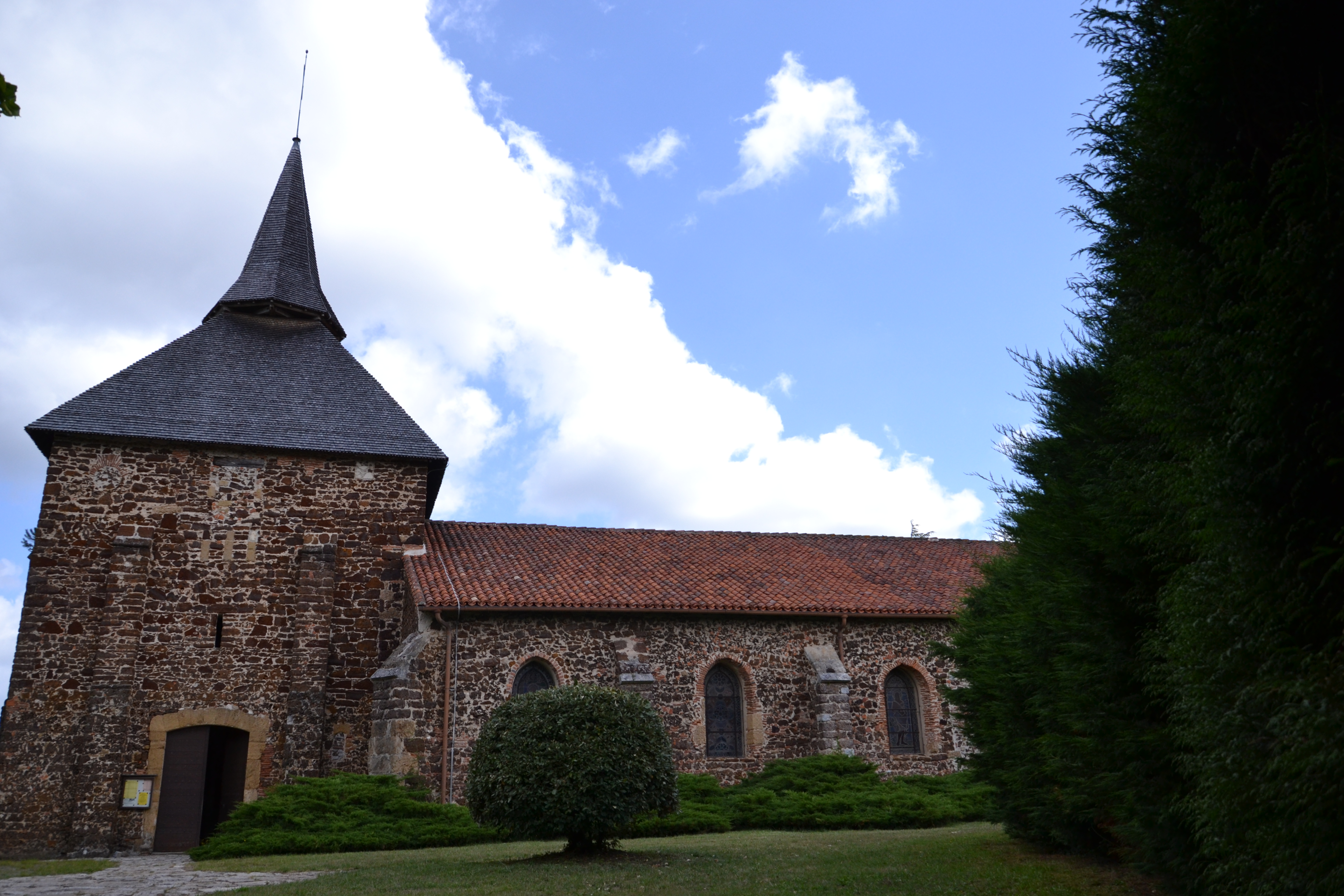 Église Saint-Jean-Baptiste de Mézos